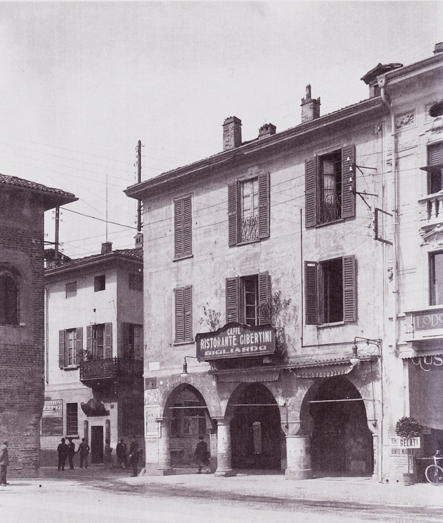 Edificio scomparso, in piazza Maggiore (attuale piazza della Vittoria) ang. via Fratelli Gabba a Lodi